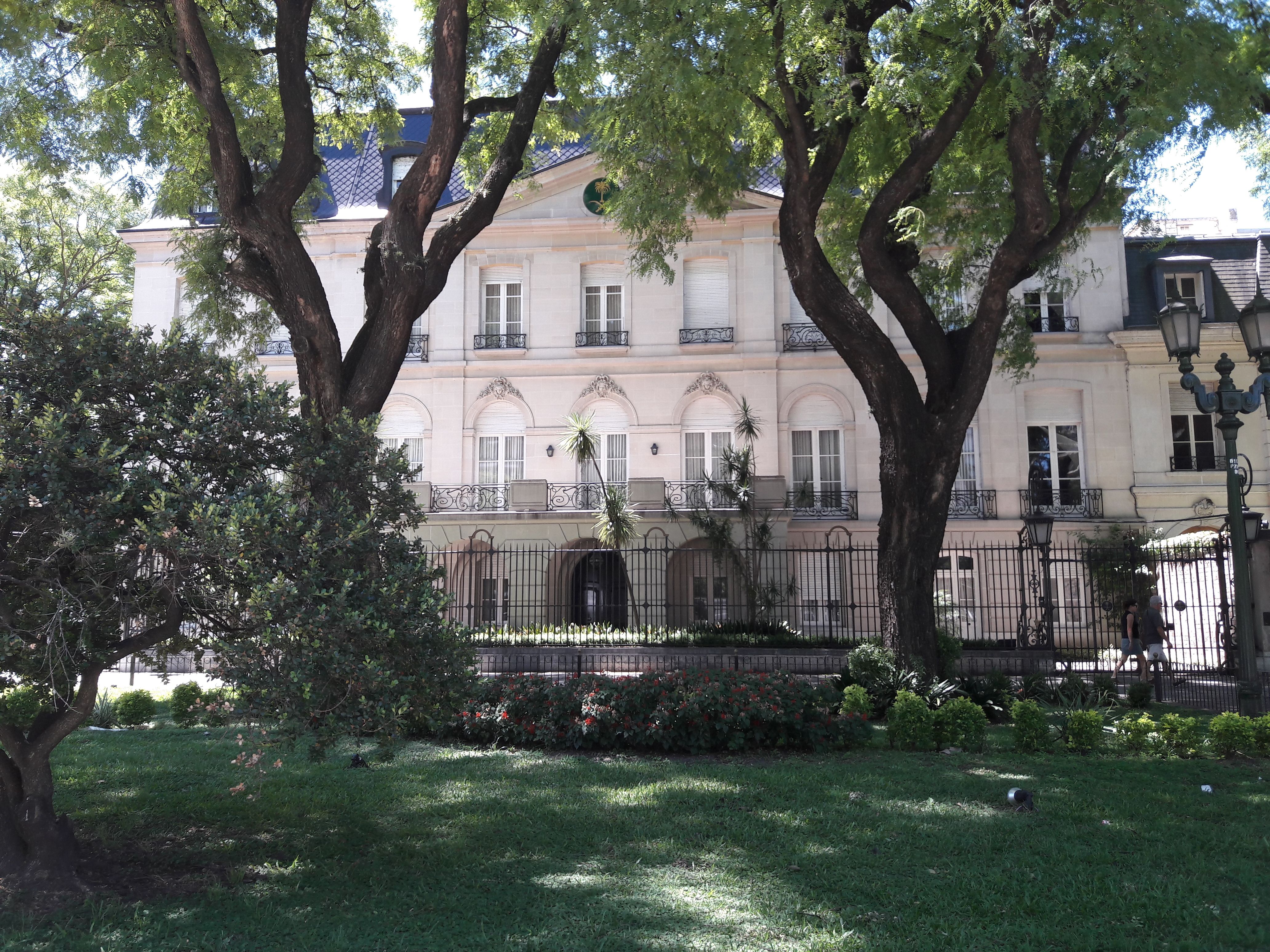 Embajada de Arabia Saudita, Palermo, Buenos Aires, Argentina.